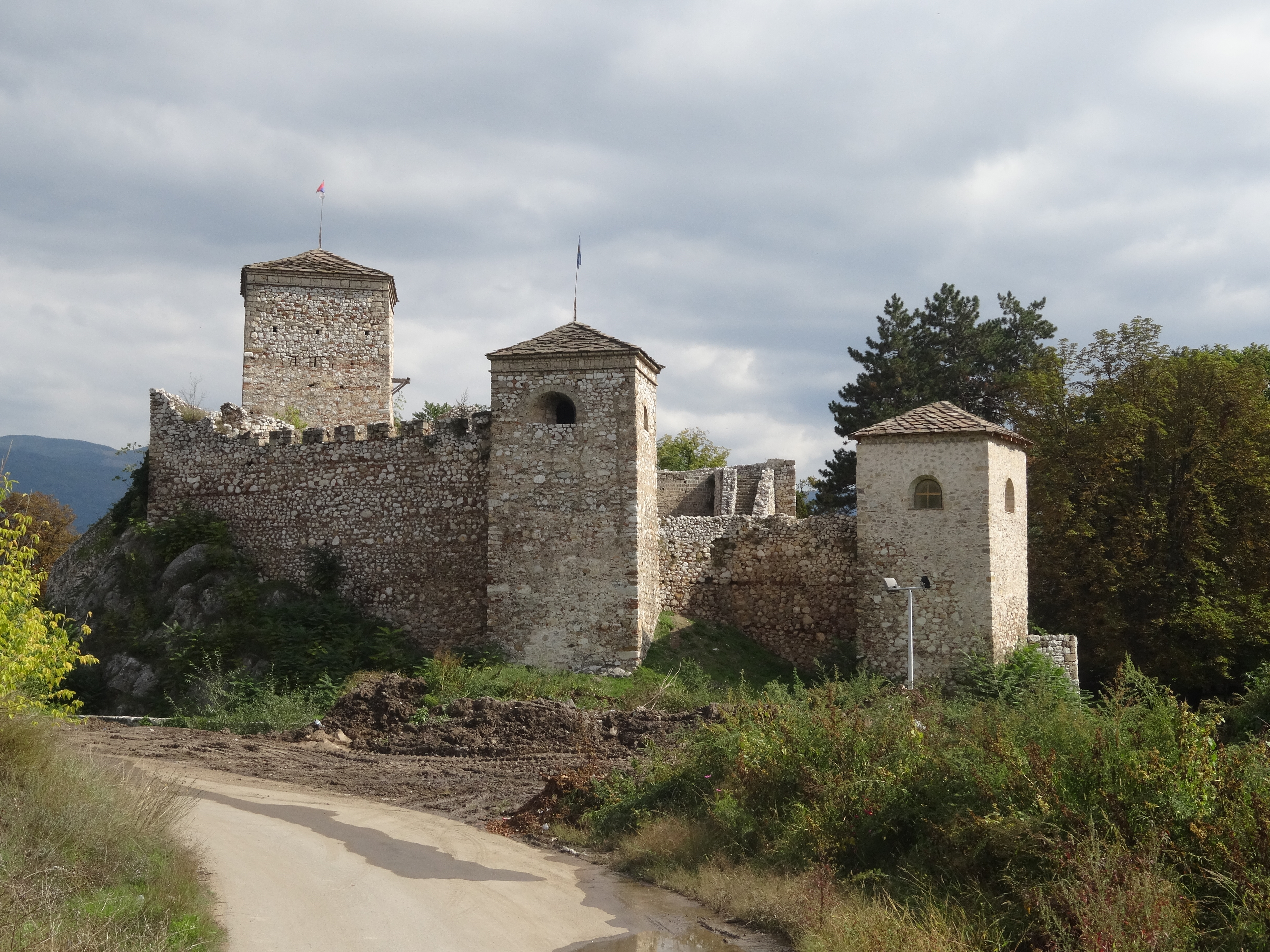 Pirotska tvrđava, Pirot